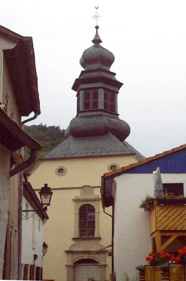 St. Philippus und Jakobus, Wolfstein (Pfalz)